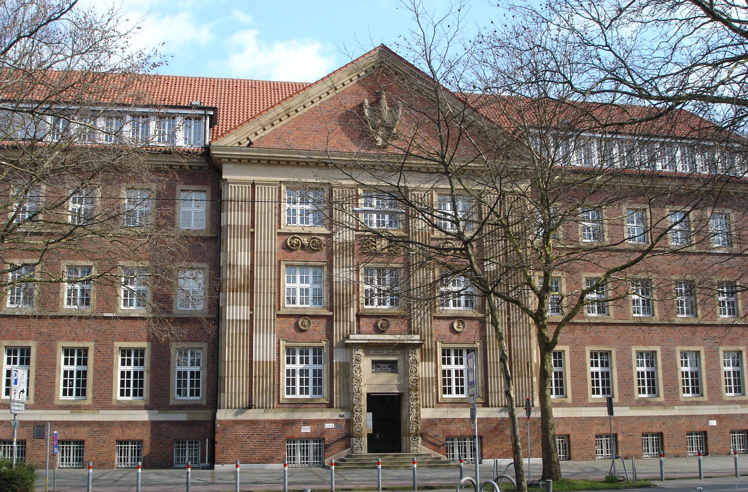 Gebäude der ehemaligen Oberpostdirektion Münster am Hohenzollernring in Münster, Westfalen; erbaut 1925